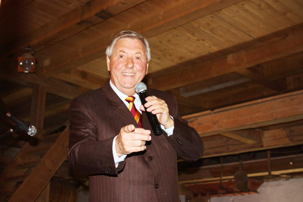 Karl Moik zum 12, Hof-&Scheunenfest im Museumsgutshof Sonnekalb in Kleinheringen